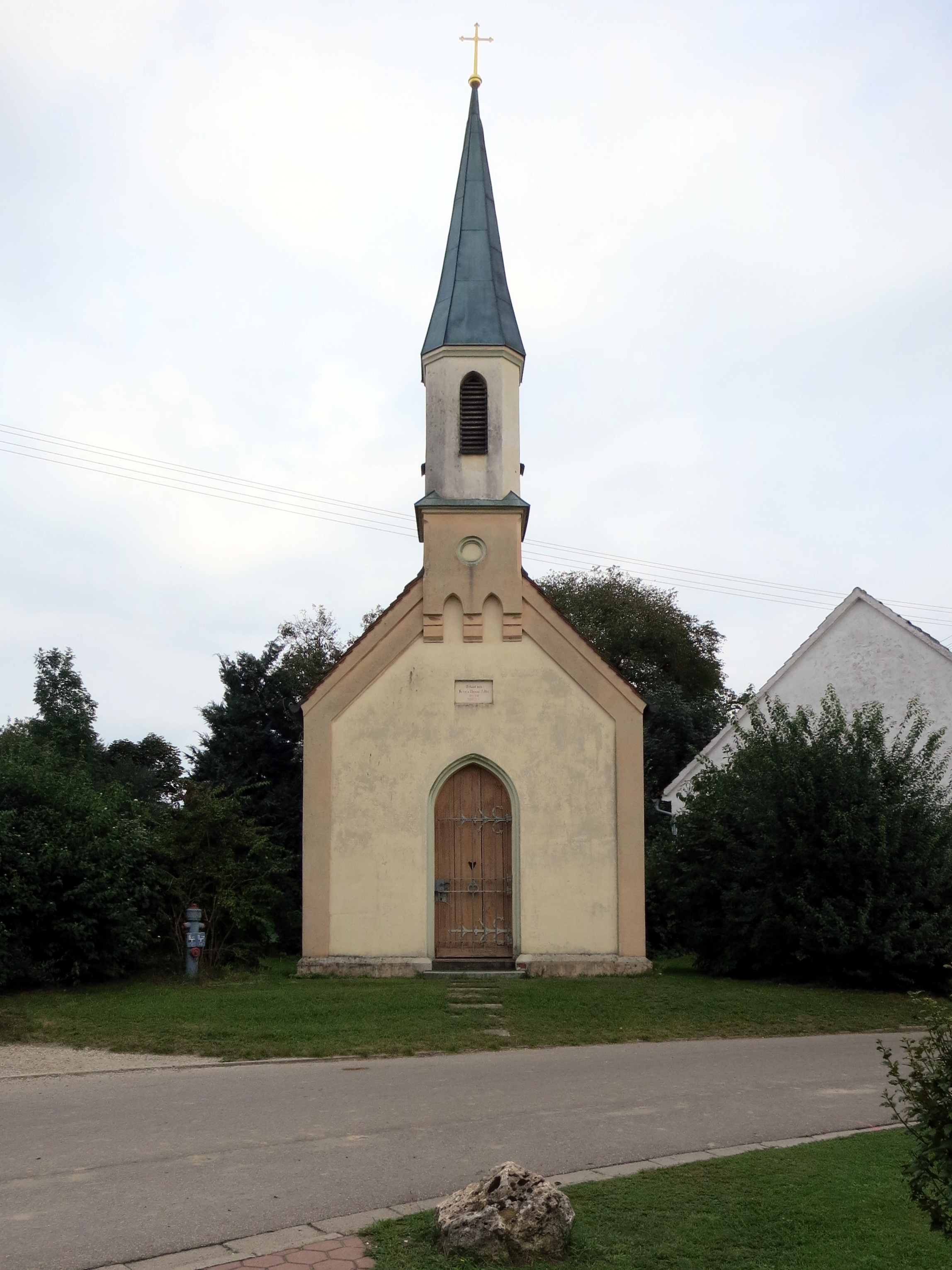 Kapelle St Maria in Rudersberg, Gemeinde Altomünster, SüdWest-Seite